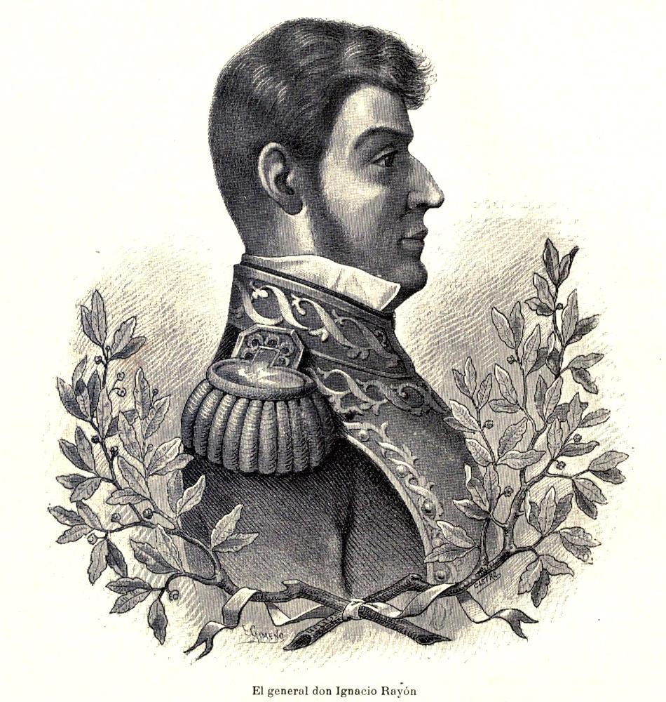 Imagen extraida del libro de Vicente Riva Palacio, Julio Zárate (1880) "México a través de los siglos" Tomo III: "La guerra de independencia" (1808 - 1821)